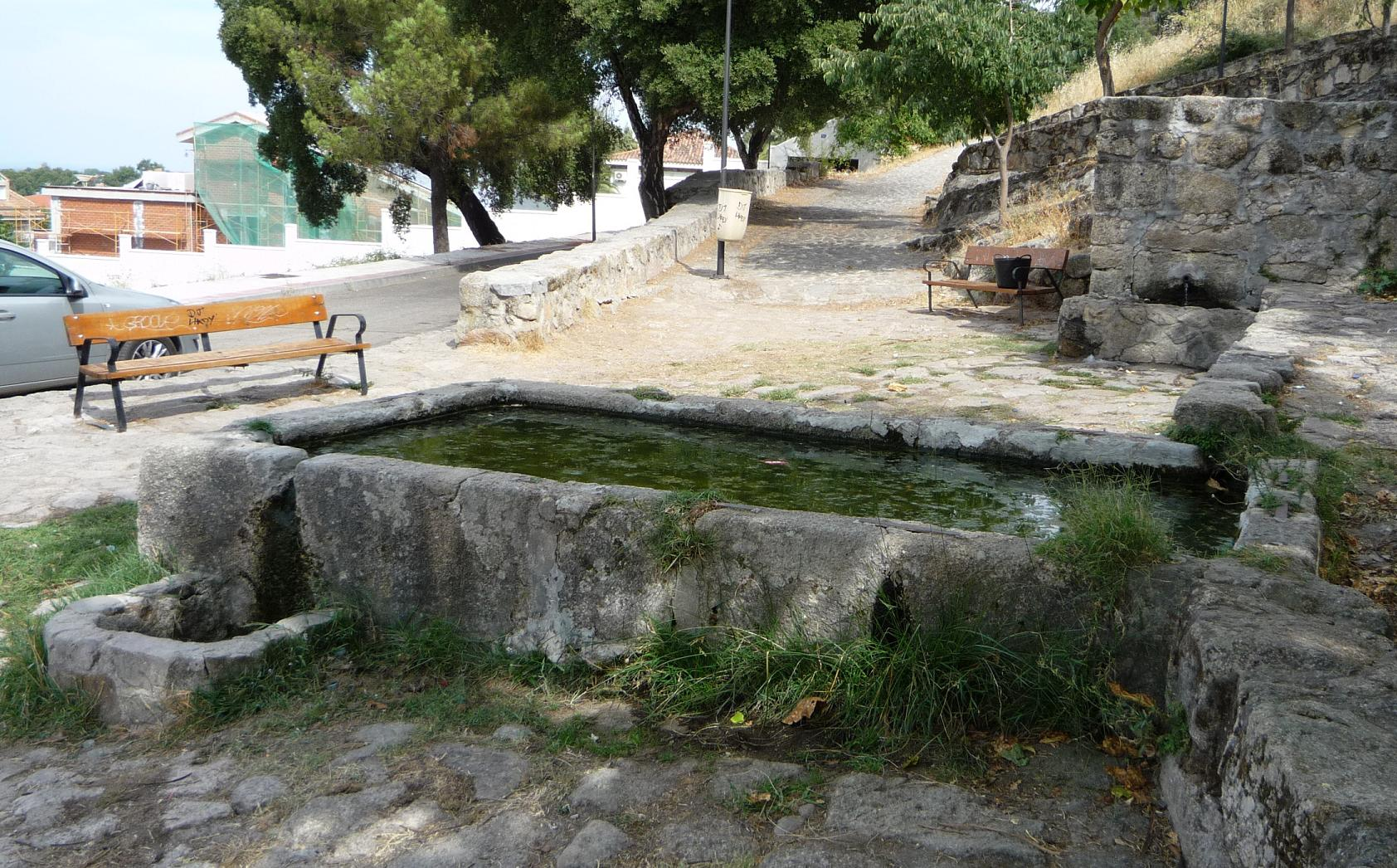 Navalmoral de la Mata abrevadero